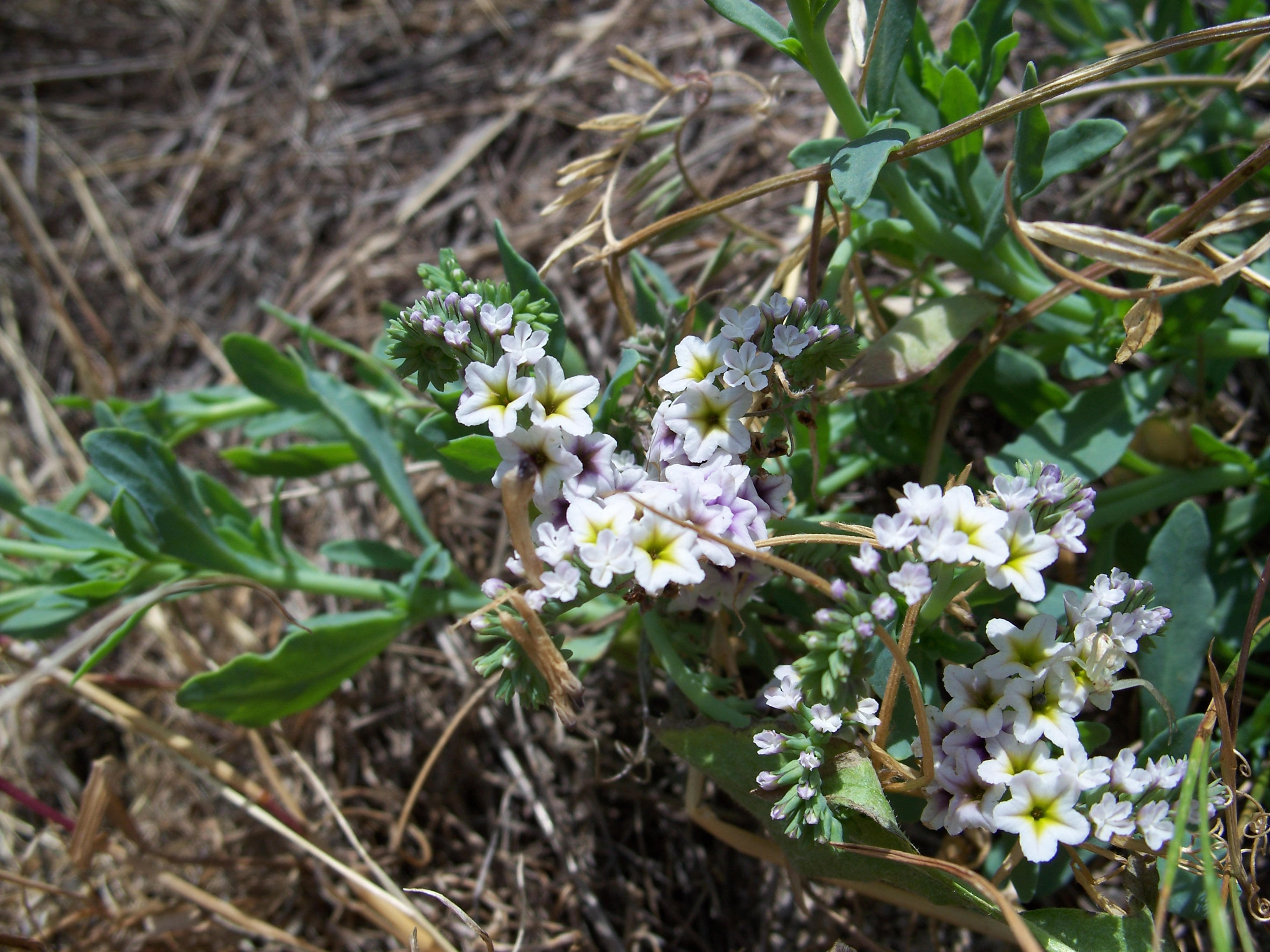 Heliotropium europaeum Made in Almaden Quicksilver County Park, San Jose, California, USA. Identified by Aroche.